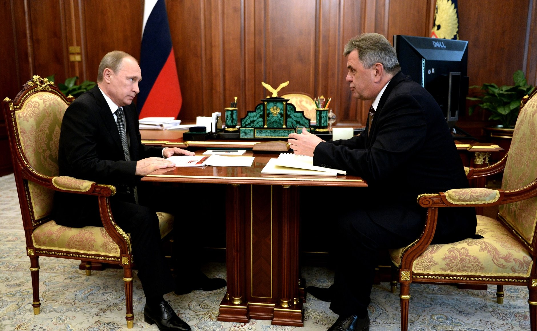 Рабочая встреча Президента России Владимира Путина с губернатором Ярославской области Сергеем Ястребовым